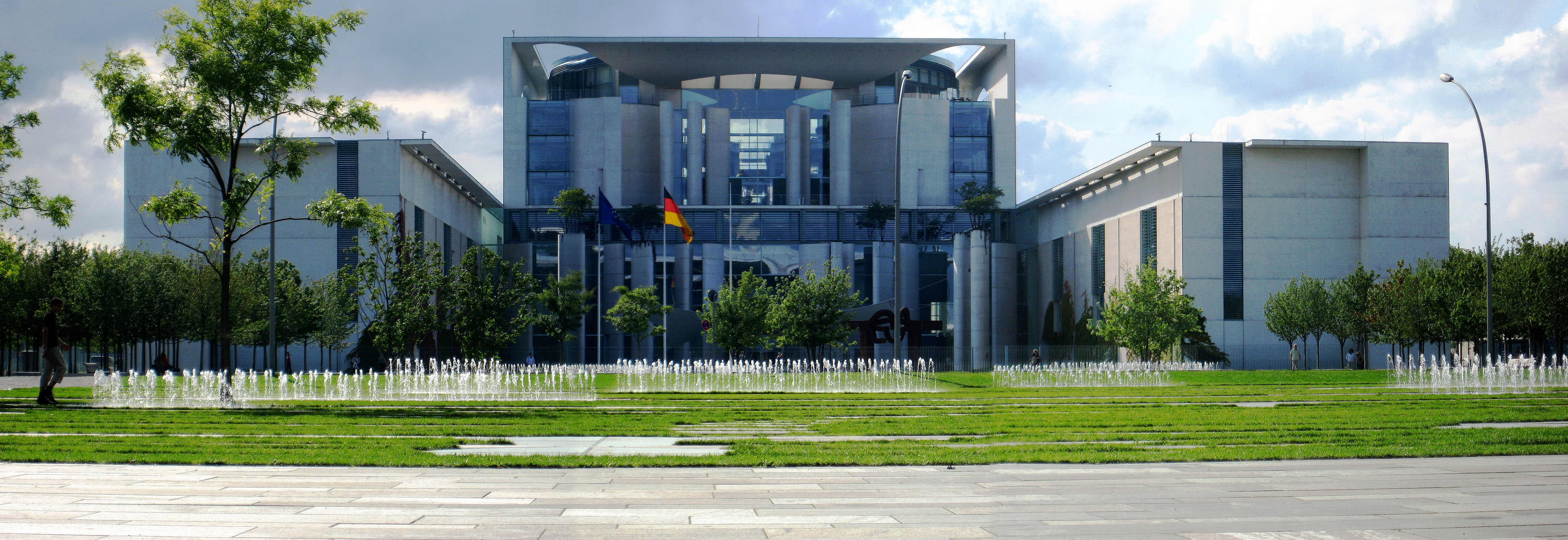 Bundeskanzleramt in Berlin-Mitte, aus 3 Bildern zusammengestitcht.